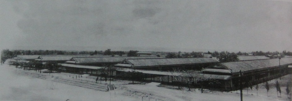 臺灣省立臺中工業職業學校1945年時的景象